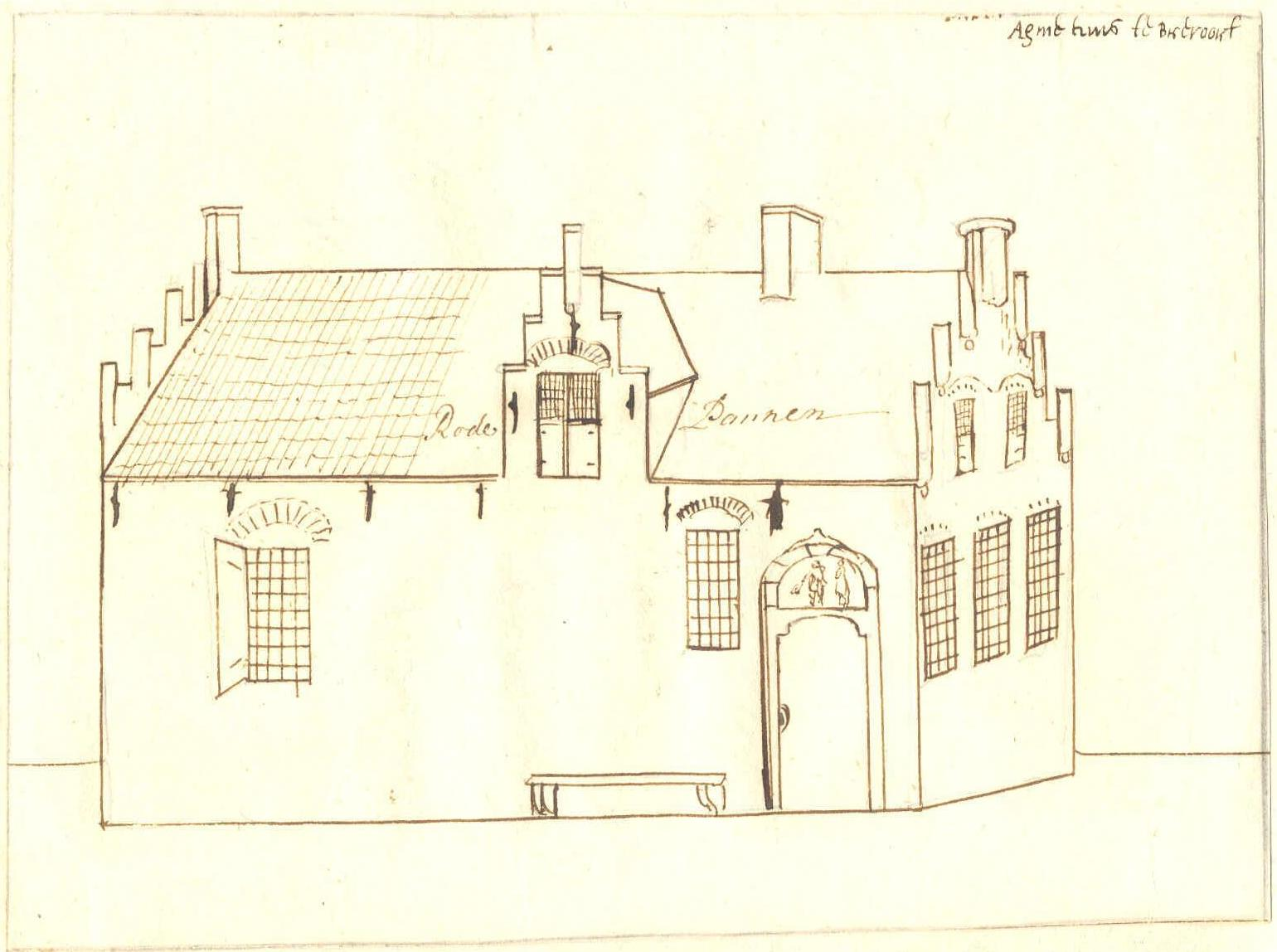 Agnietenhuis, Bredevoort (Netherlands)